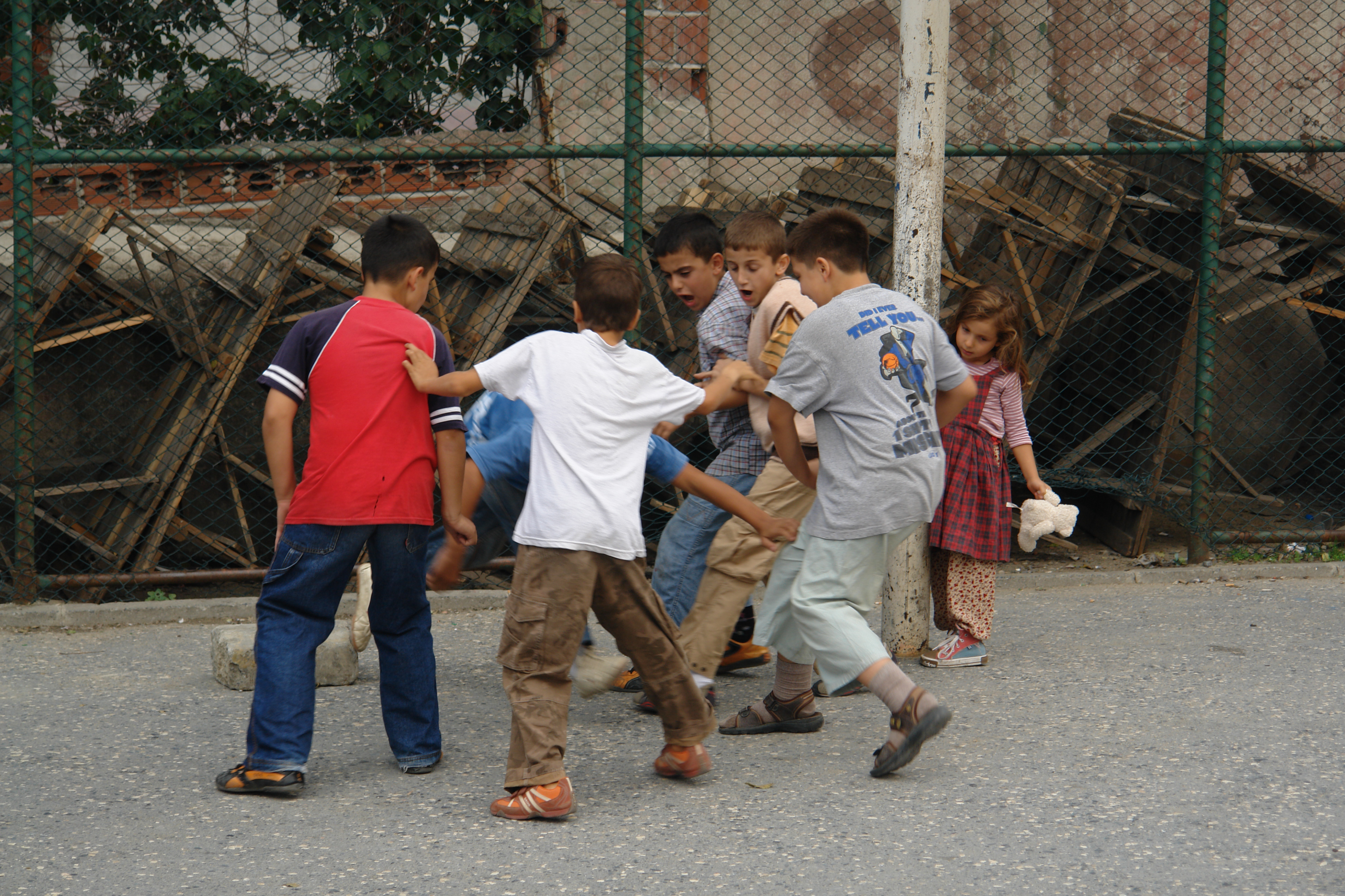 Bende Sira Screenshot